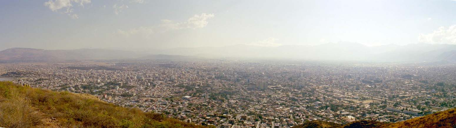 CochabambaBolivia